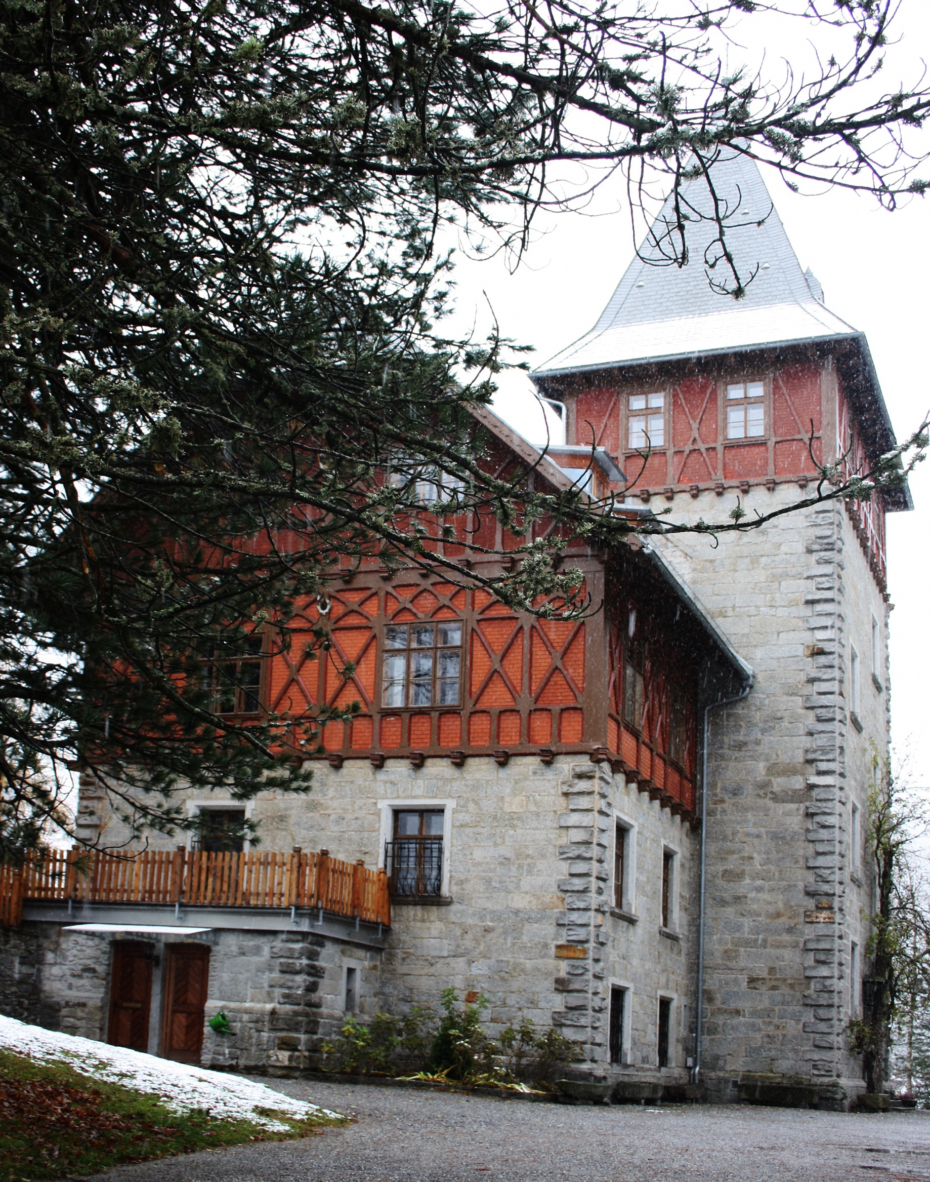 Jagdschloss Czernin in Böckstein, Gasteinertal, Österreich